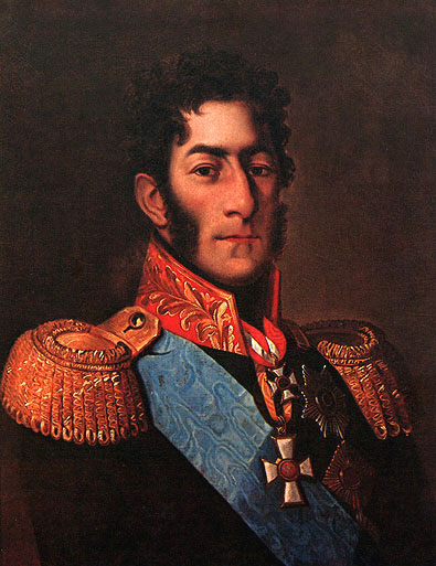 Петр Иванович Багратион, Неизв. худ. 1840-е годы